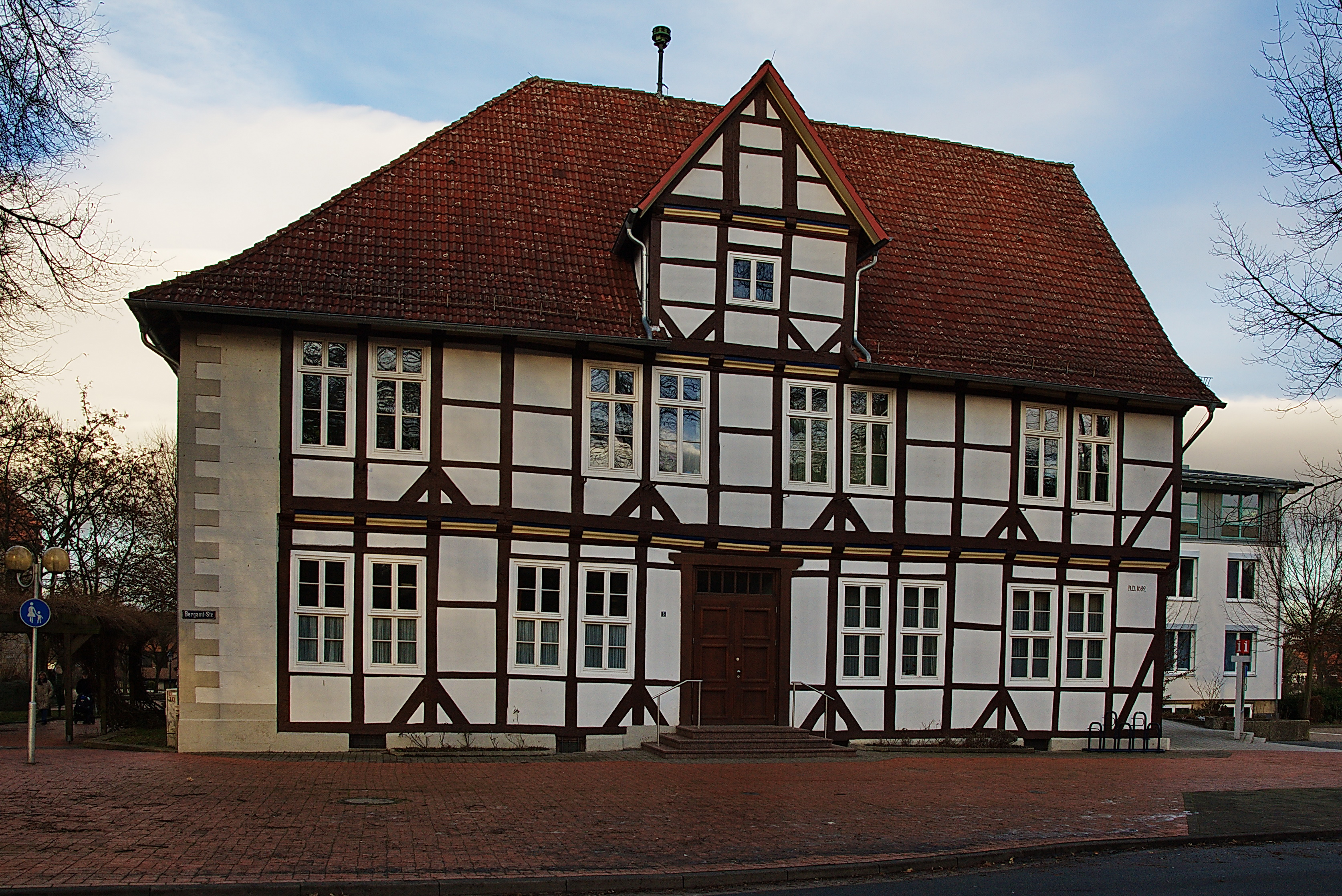 Rathaus Barsinghausen, Niedersachsen, Deutschland